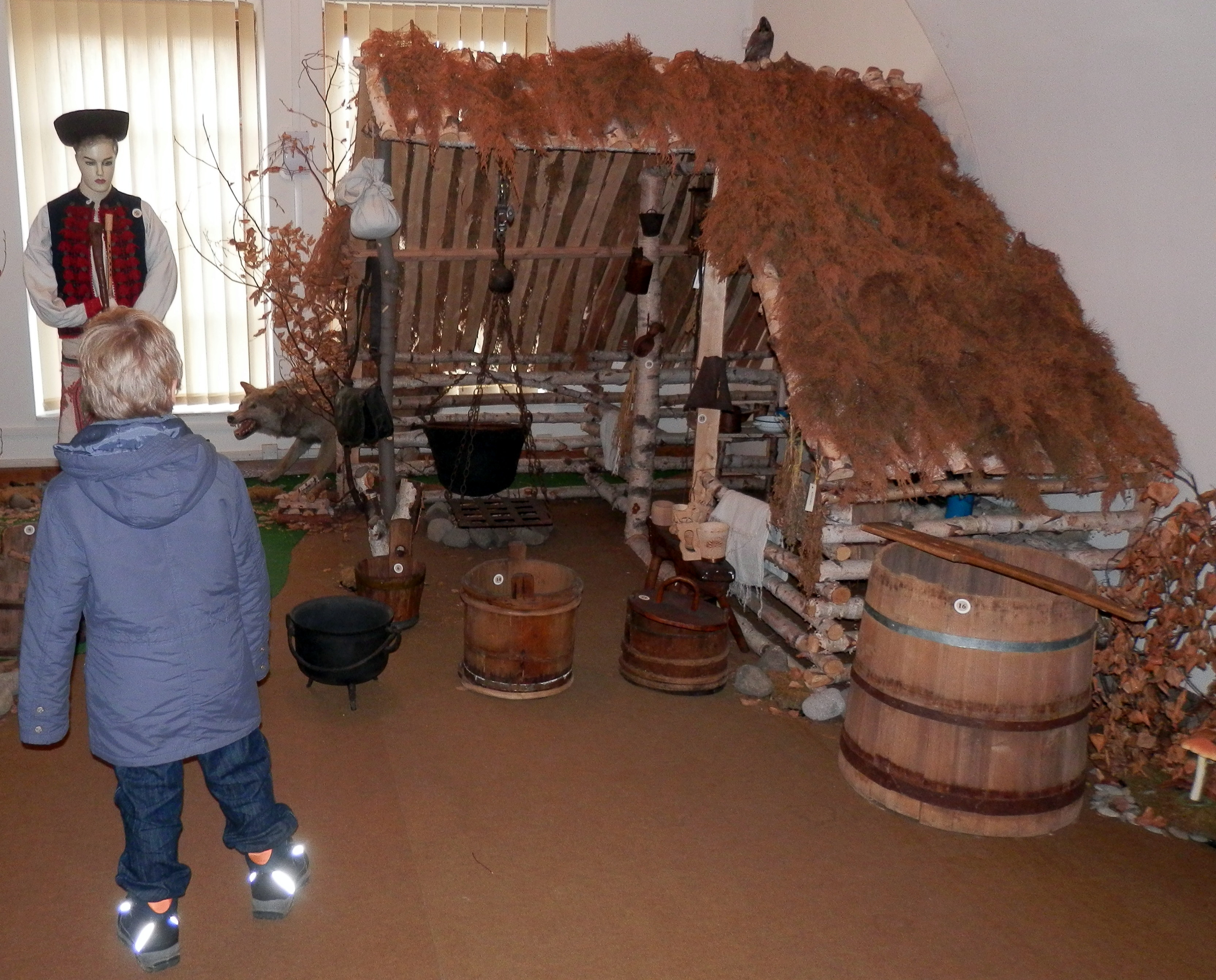 Interiér Krajského múzea Prešov.